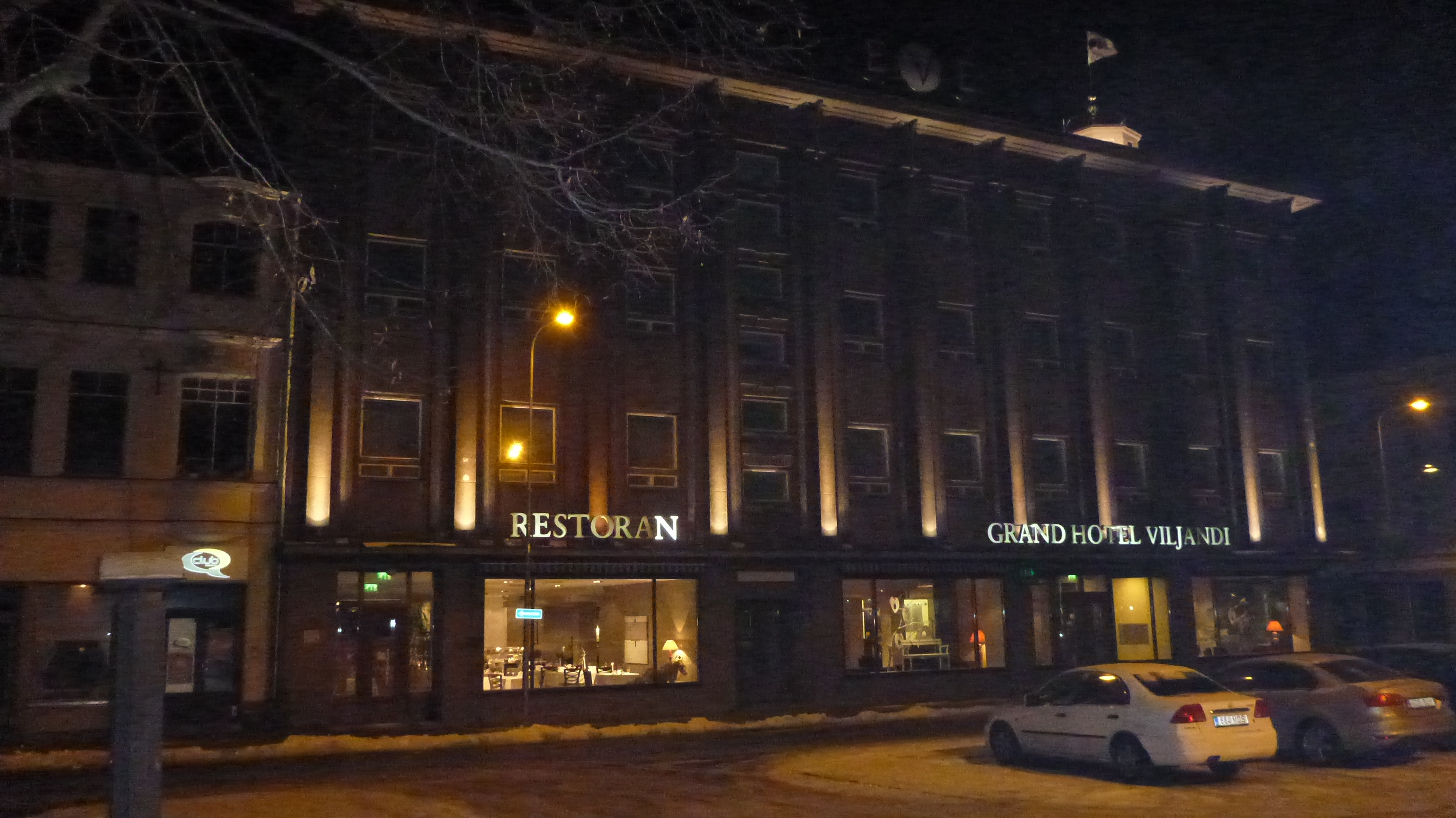 Grand Hotel Viljandin keskustassa